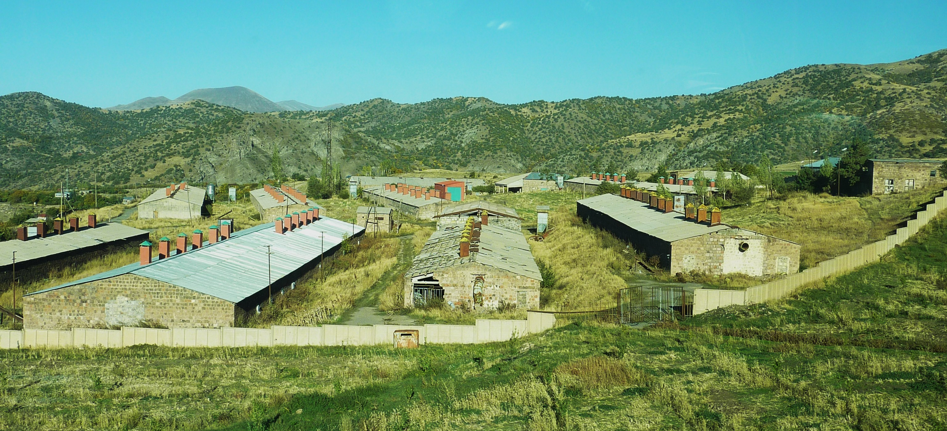 Ancien kolkhoze près de Djermouk